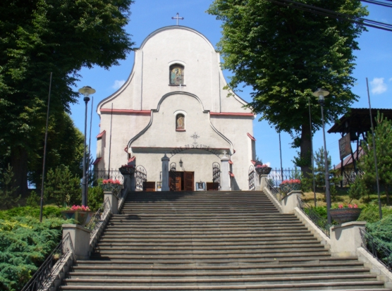 Kościół w Łysej Górze w województwie małopolskim